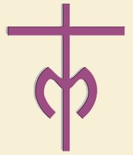 Cruz marianista